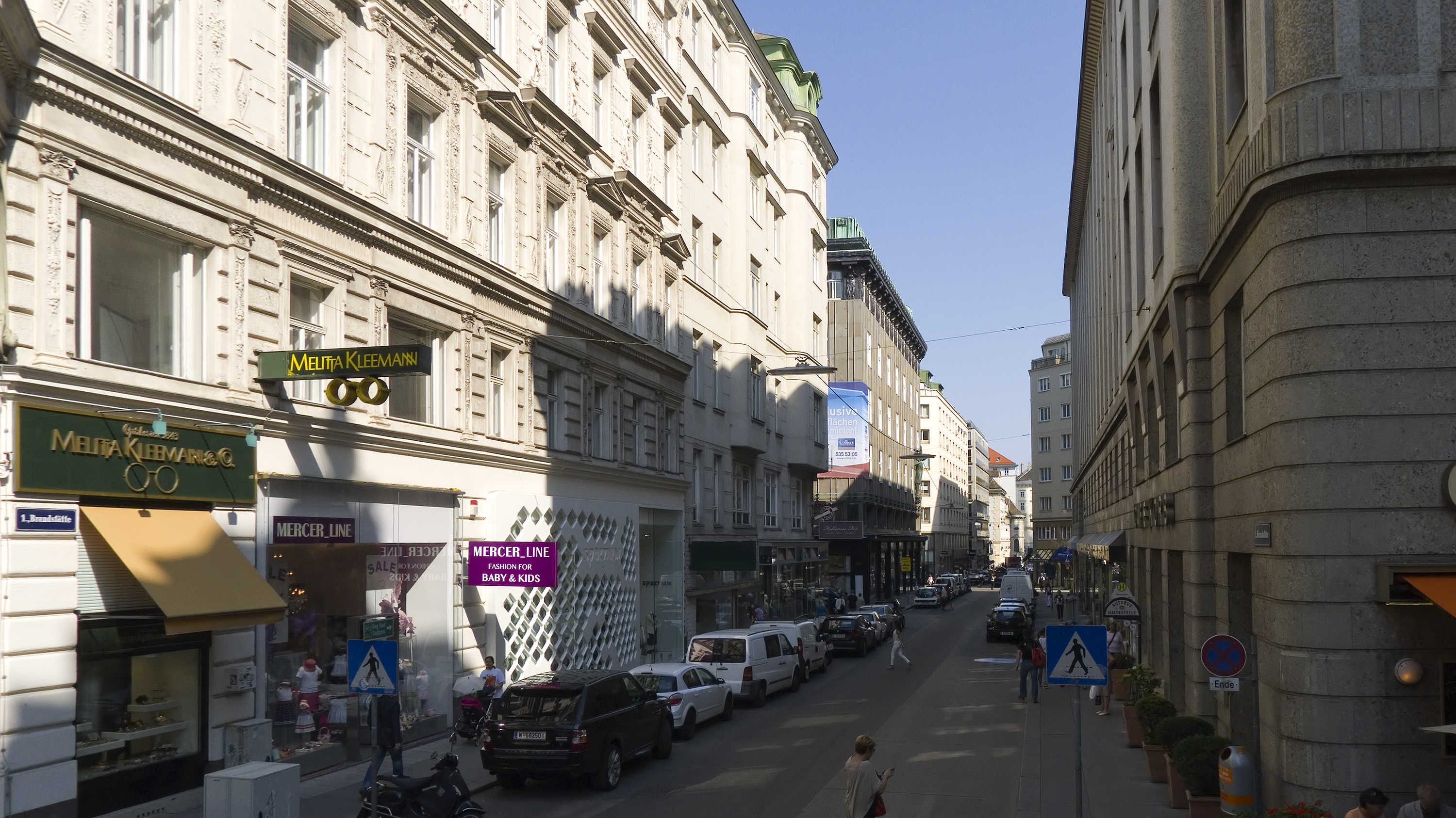 Brandstätte in Wien 1 bei den Tuchlauben Richtung Südosten